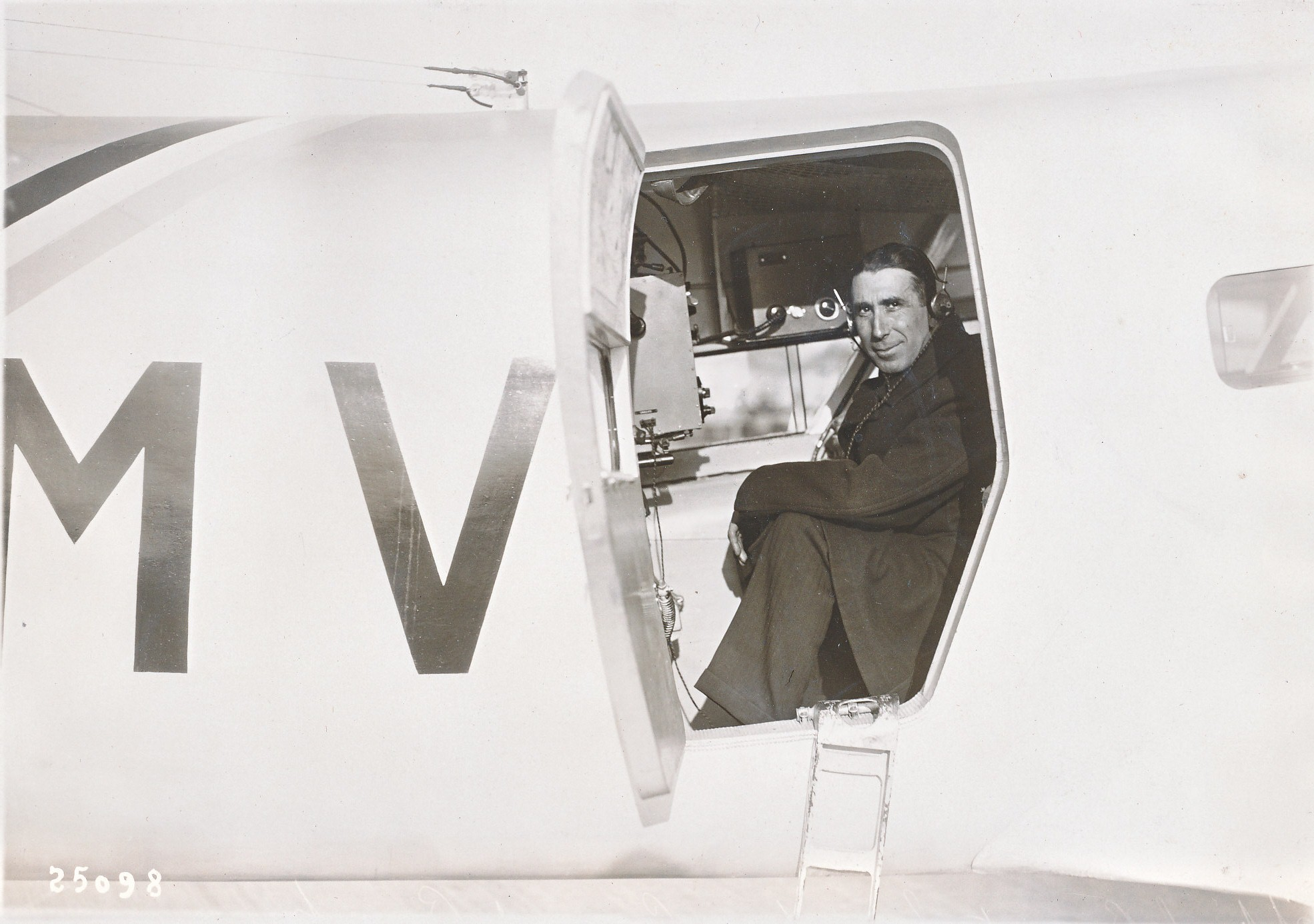 Biarritz porte avec Max Dévé 1933.